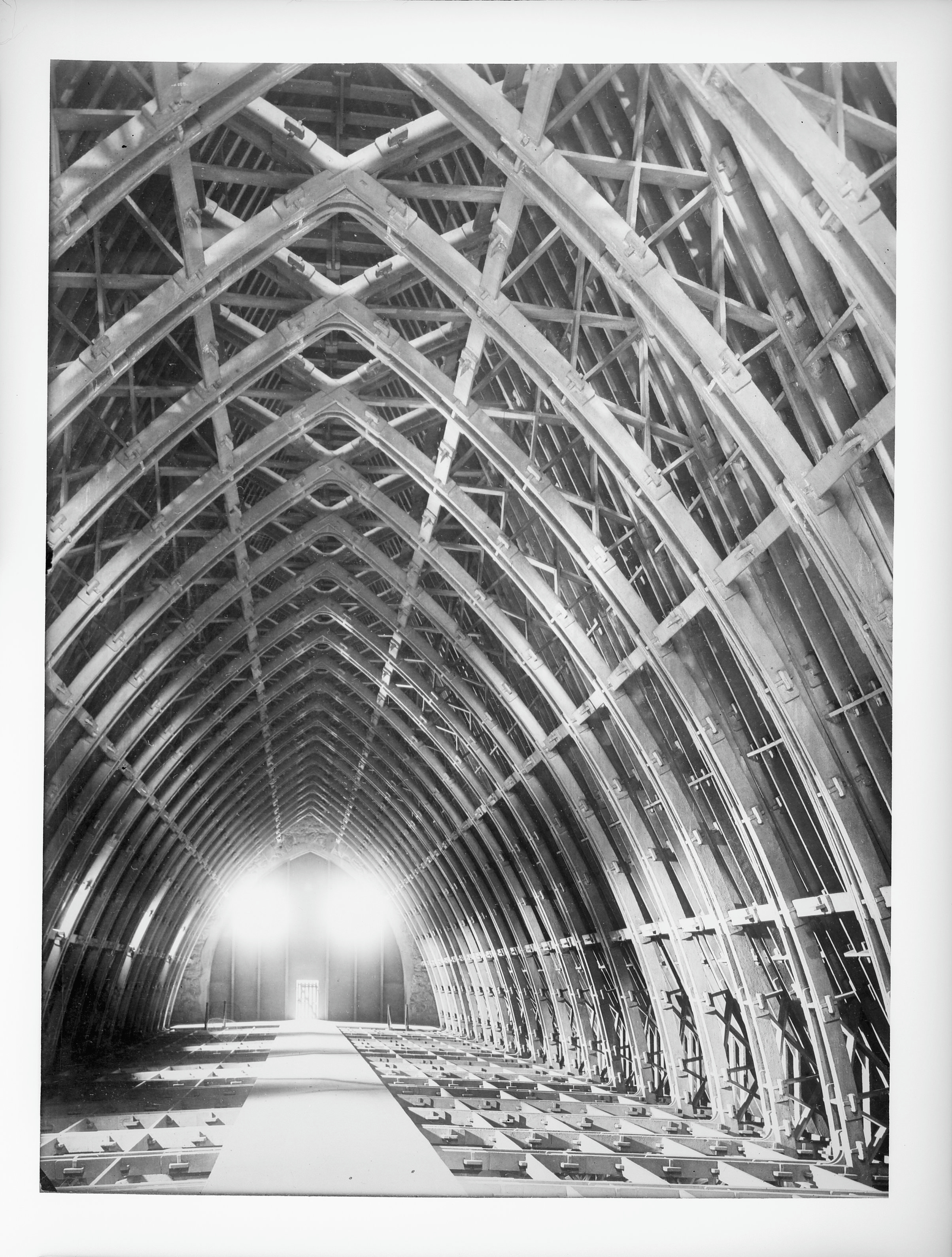 Kathedraal: Interieur, reproductie van foto met nieuwe bekapping in gewapend beton (opmerking: Uit Frankrijk meegebracht, januari 1935)